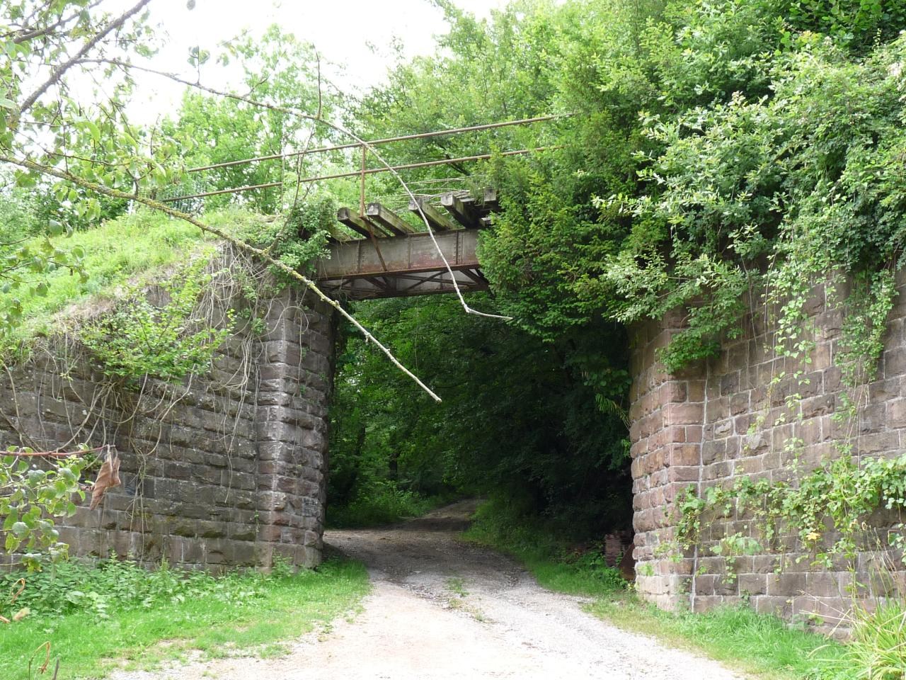 Brücke der Pforzheimer Kleinbahn nahe der Hochmühle südlich von Weiler